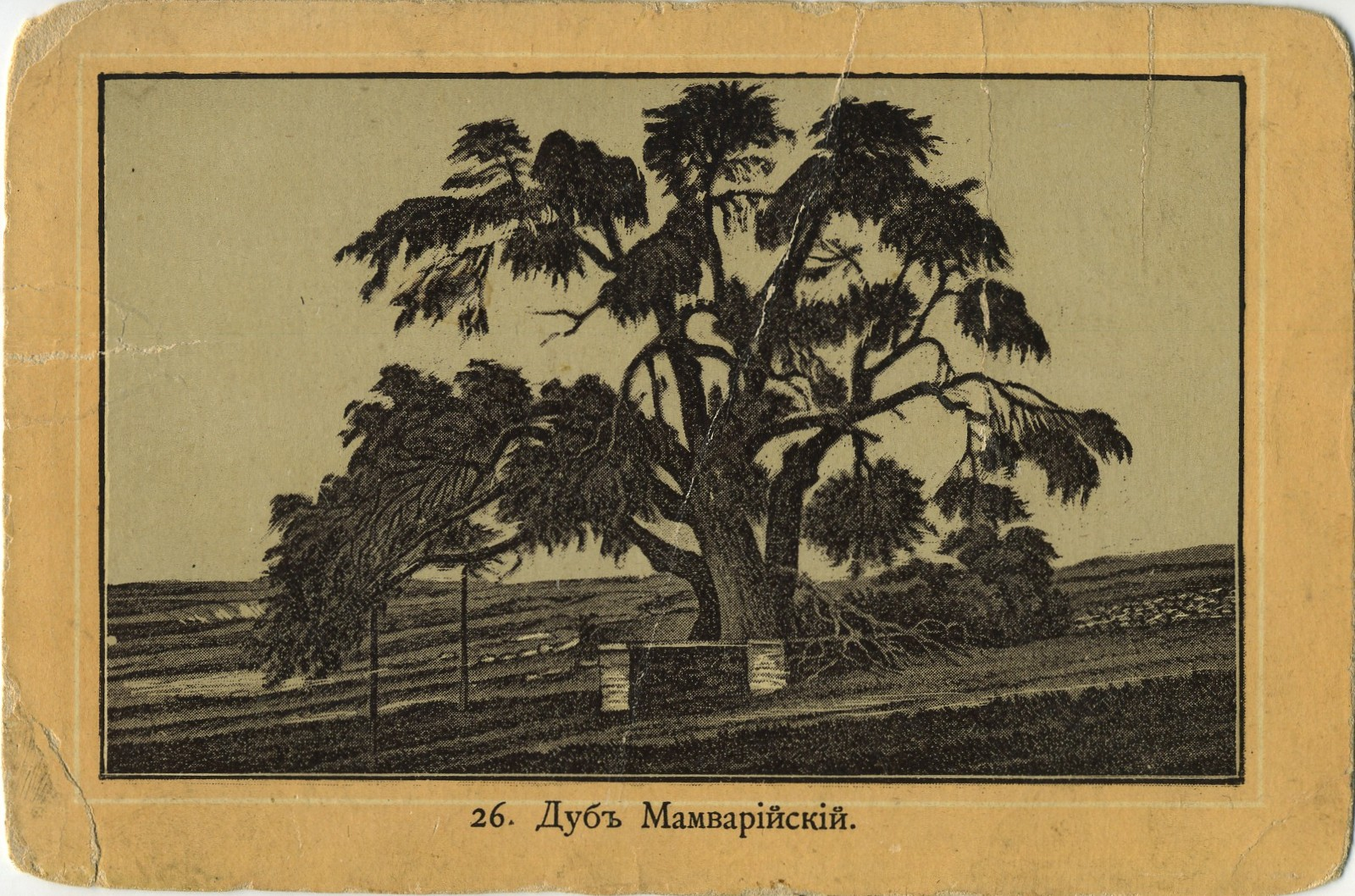 Дуб Мамварийский, русская гравюра. Непочтовая открытка Российской Империи.